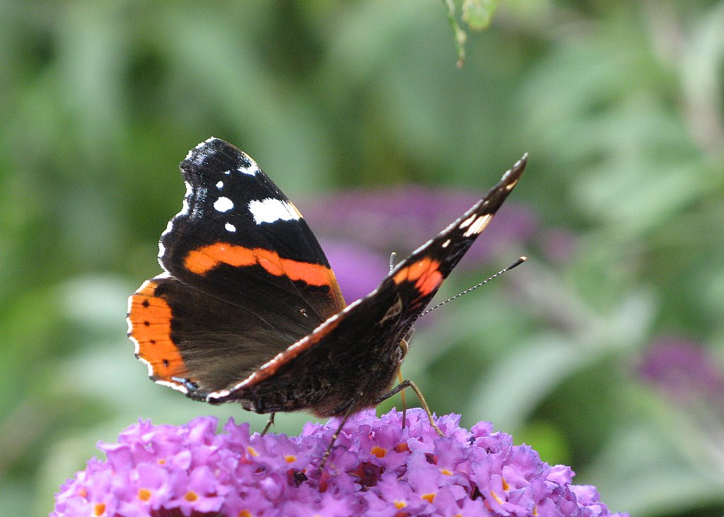 Vanessa atalanta, Molsbroek, Lokeren, Belgium